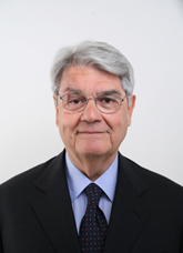 Calogero Mannino, politico italiano